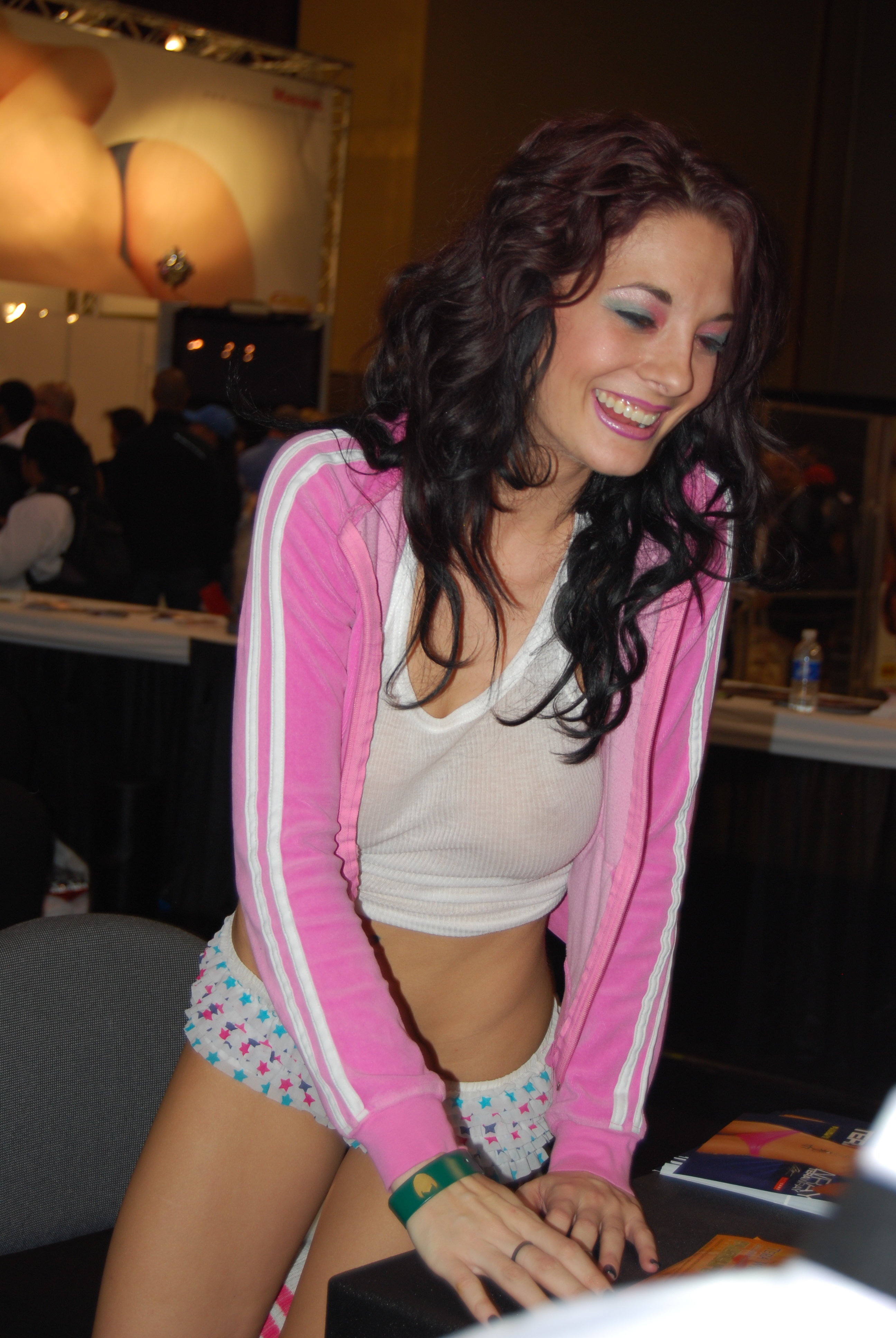 Tera Wray